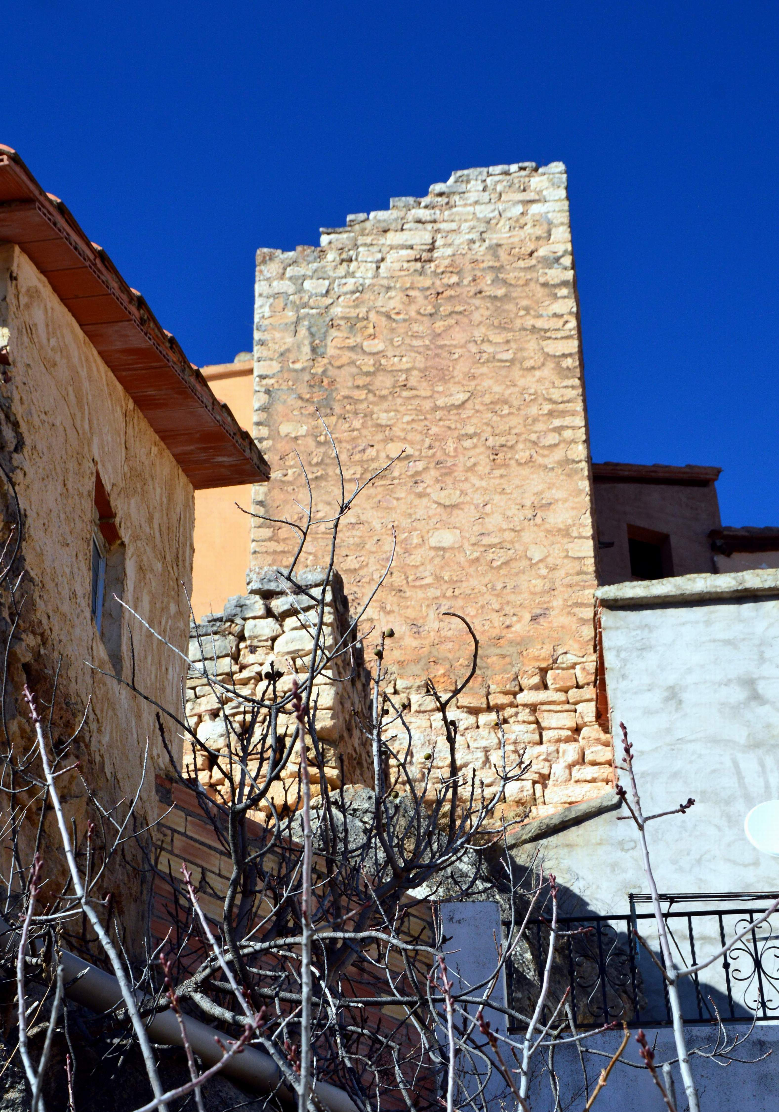 Paisaje urbano de Castielfabib (Valencia), con detalle del Torrejón, situada en el sector suroriental del recinto amurallado (2019).